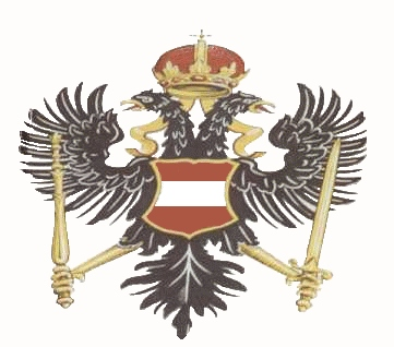 historisches Wappen von Vorderösterreich